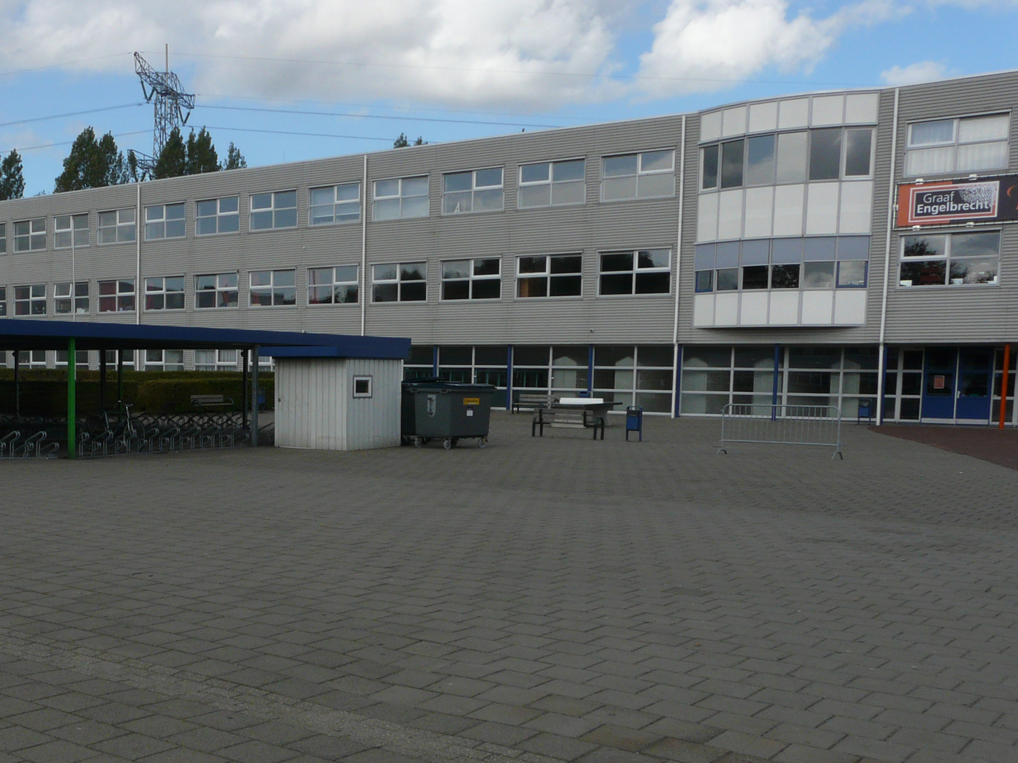 Zicht op een deel van de voormalige inrichting van het schoolplein van de scholengemeenschap Graaf Engelbrecht, Ganzerik 3, 4822 RK Breda. Gelegen in de wijk Paradijs in het grote stadsdeel de Haagse Beemden in het noorden van Breda